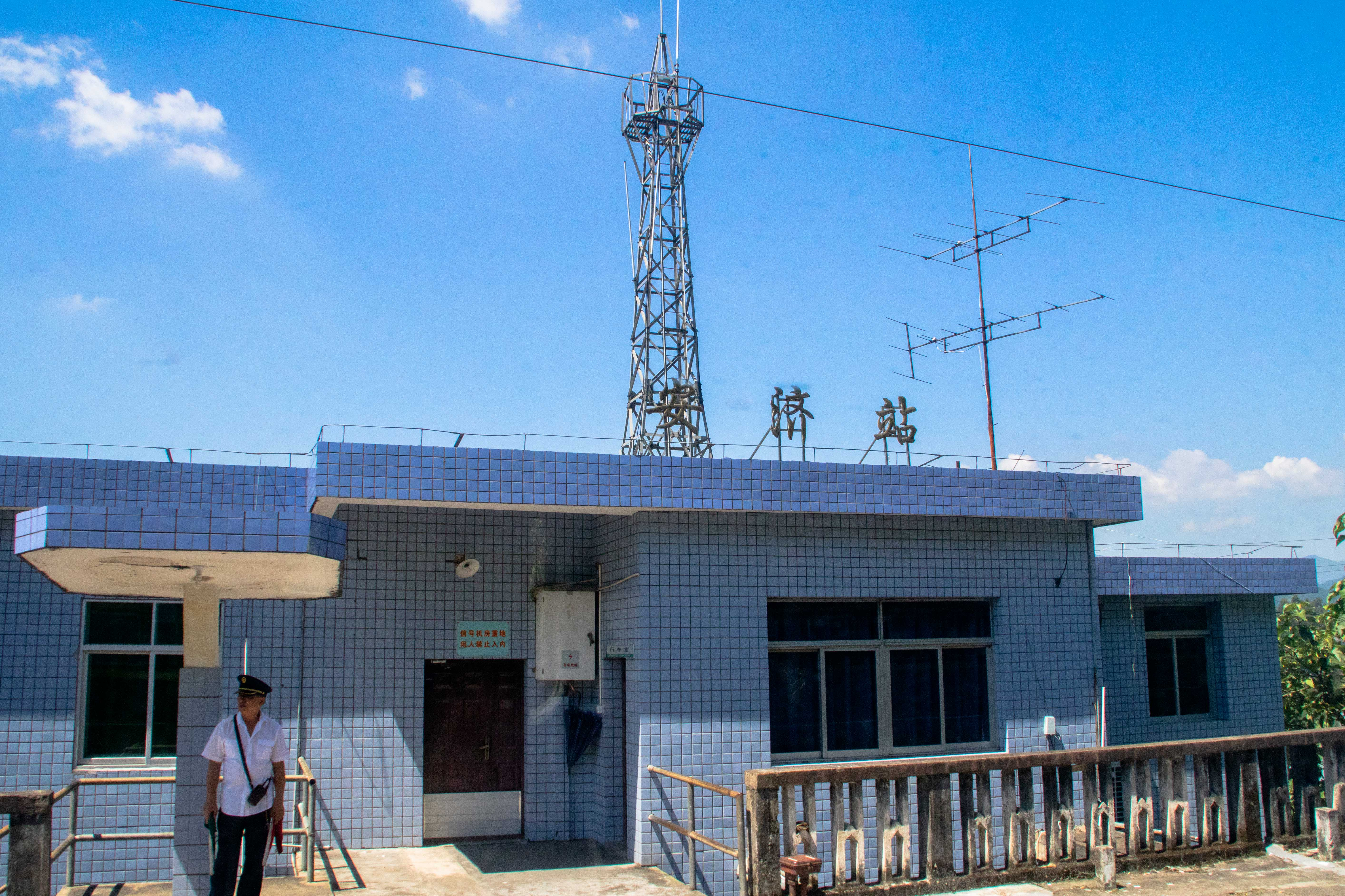 中文（中国大陆）: 安济站站房